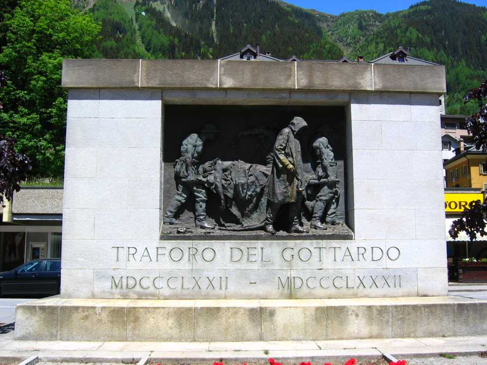 Denkmal für die 177 beim Bau des Gotthard-Eisenbahntunnel ums Leben gekommenen Arbeiter